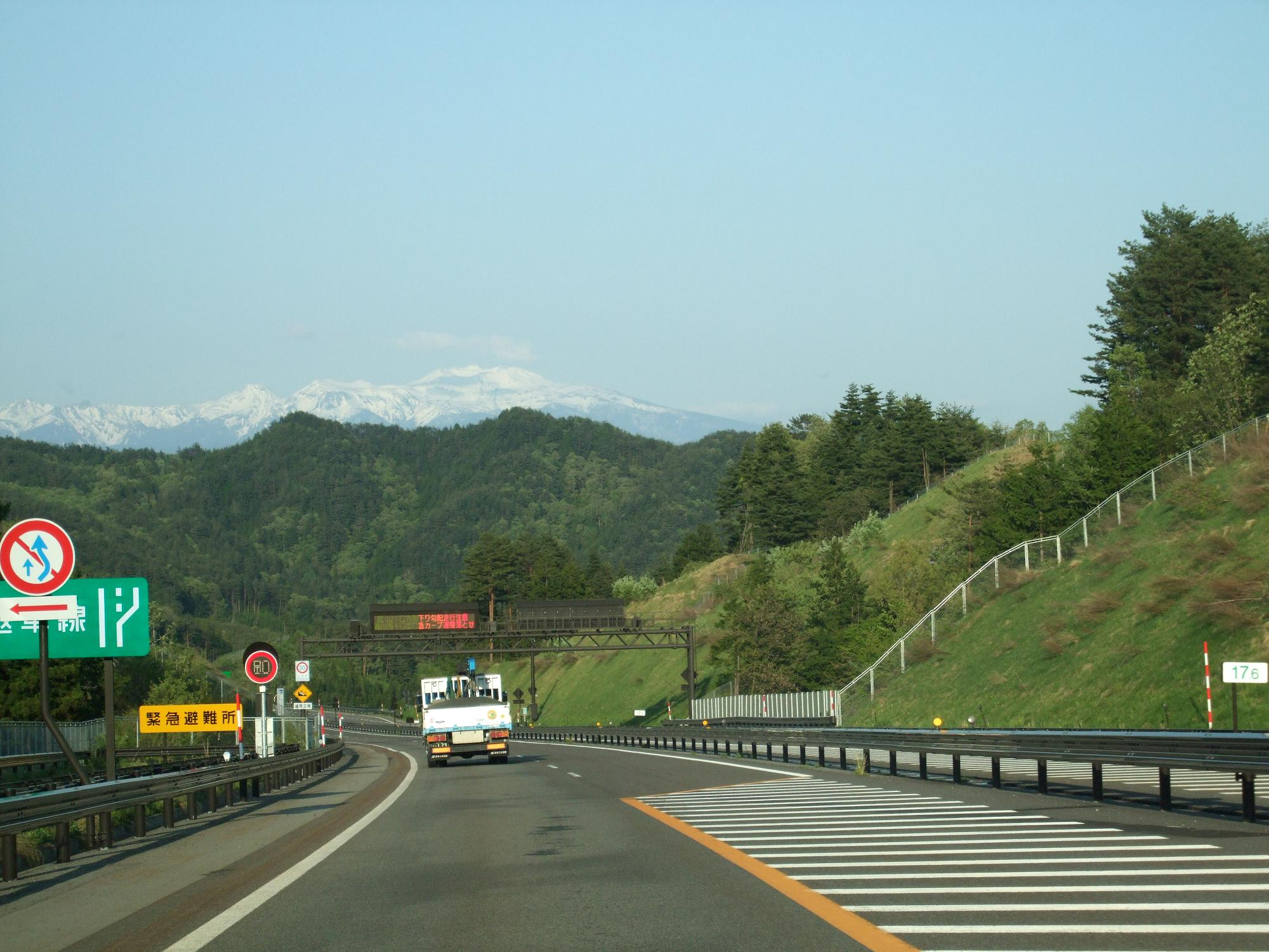 中部縦貫自動車道 高山清見道路高山西インター付近 （高山インター方面を撮影）